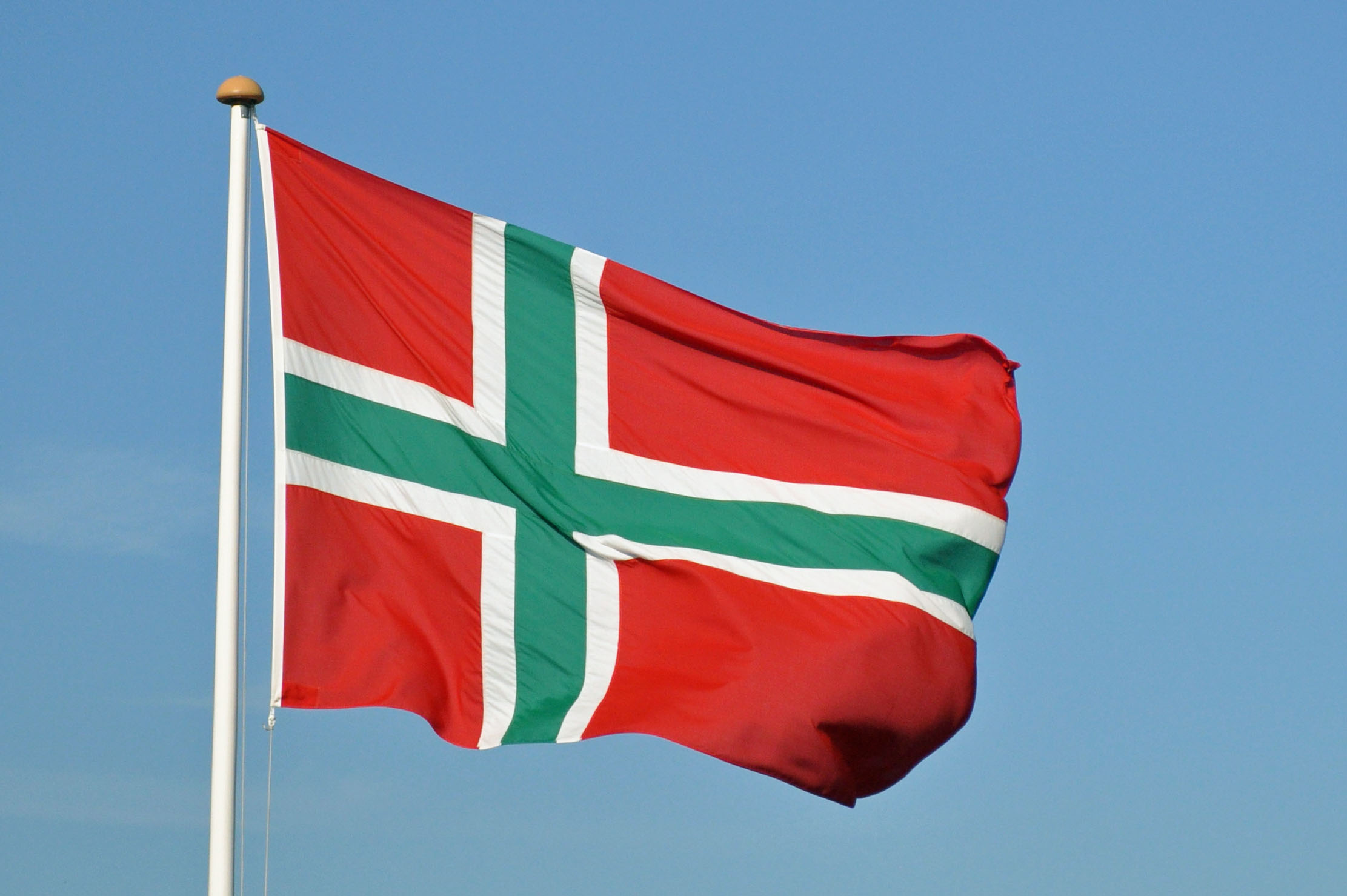 Bornholm, Flagge (2012-07-10), by Klugschnacker in Wikipedia